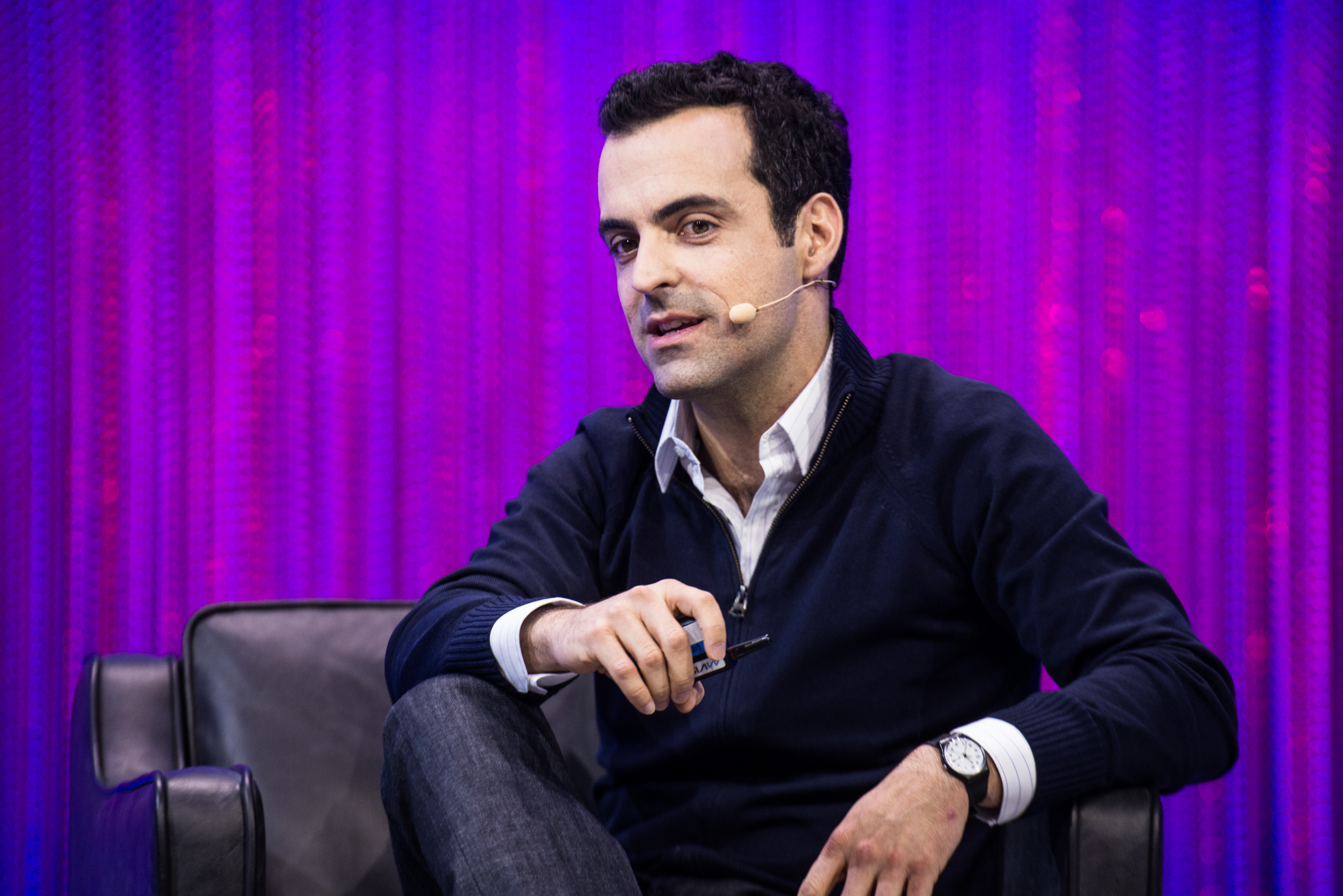 Hugo Barra, lors de la conférence Le Web 2013.